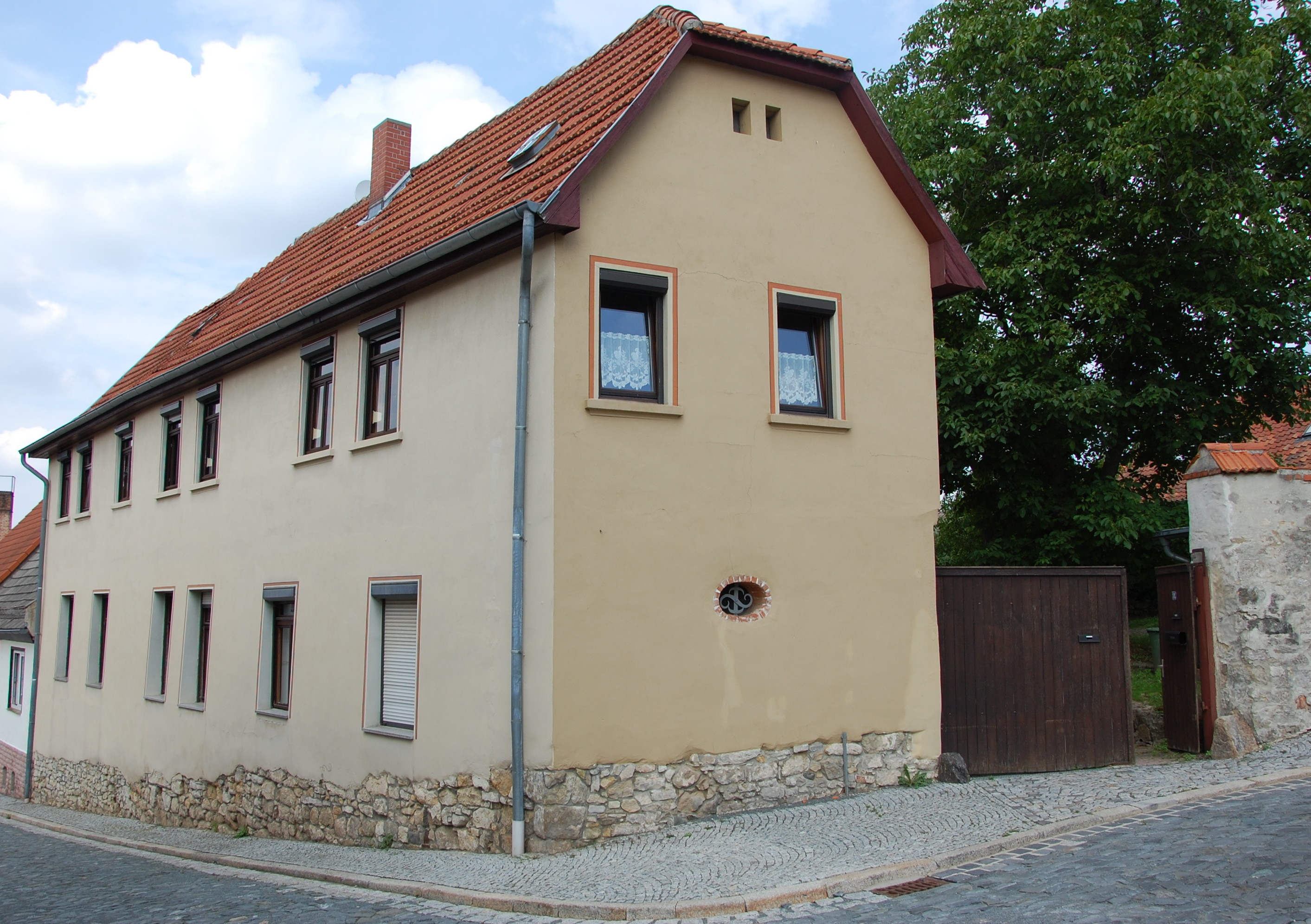 Haus Bergstraße 18 in Gernrode